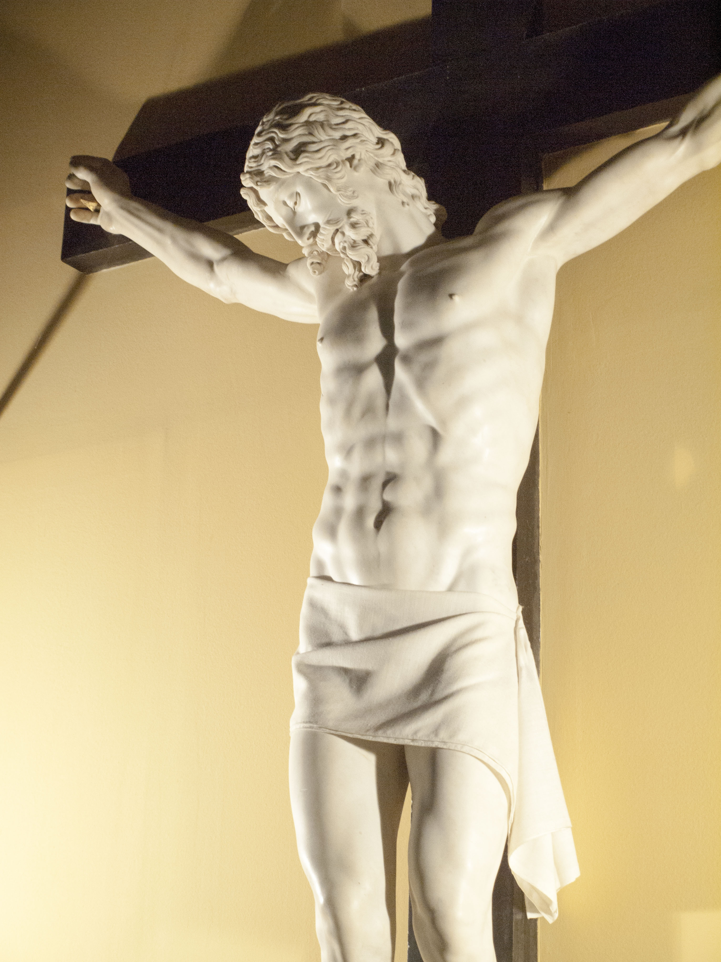 Cellinik bere hilobirako egindako kruxifijoa eta Felipe II eskuetan bukatu zen. Biluzik dagoen Kristo bakarrenetako bat, arastasun ohiala badu ere.